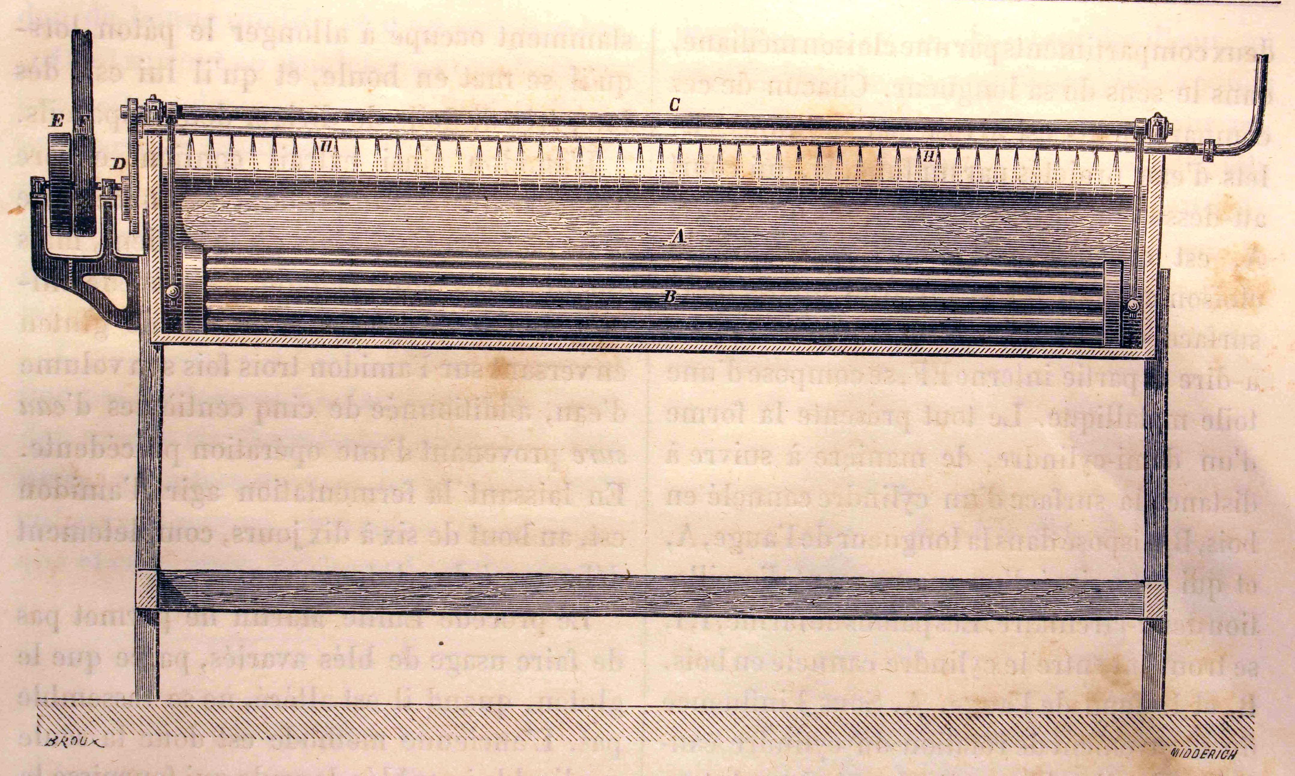 Ilustraciones de la obra : Les merveilles de l'industrie ou, Description des principales industries modernes / par Louis Figuier. - Paris : Furne, Jouvet, [1873-1877]